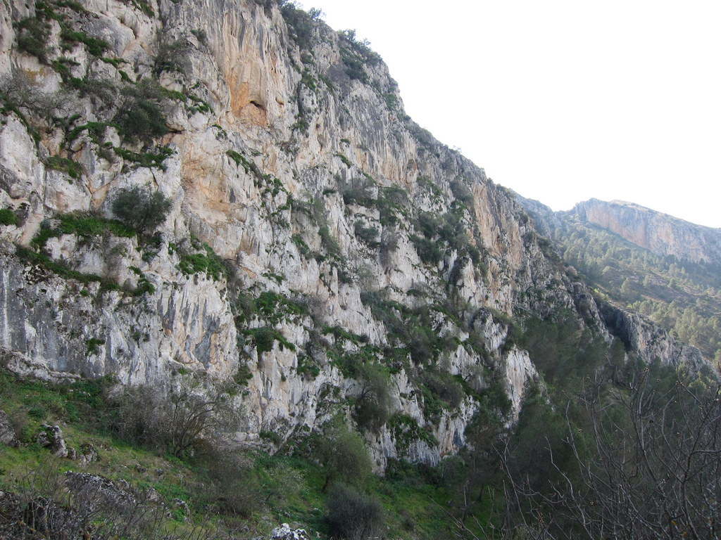 Falla de la Sierra del Camorro